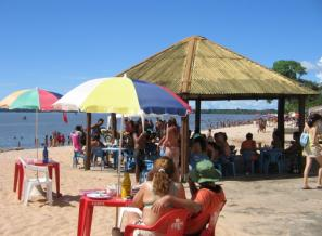 Fotografia da Praia do Caripy localizado proximo da Vila dos Cabanos